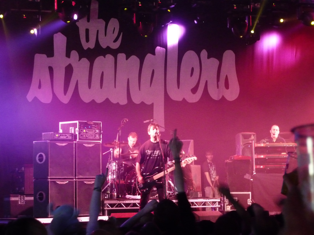 stranglers